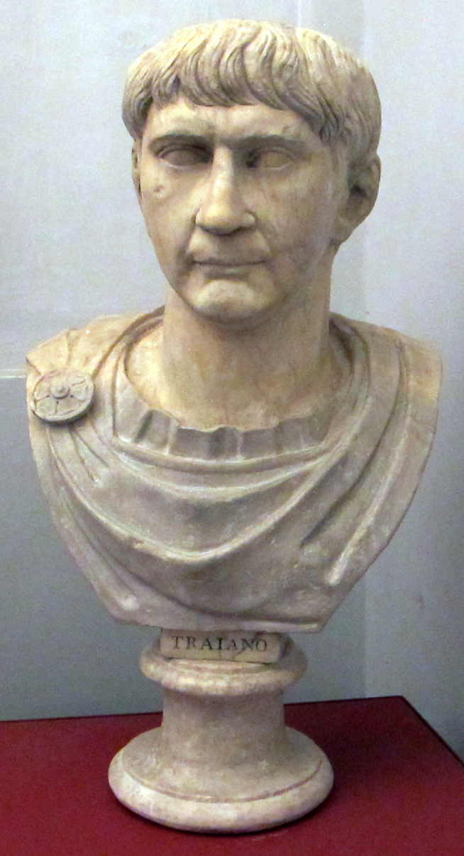 Palazzo Medici-Riccardi, Firenze